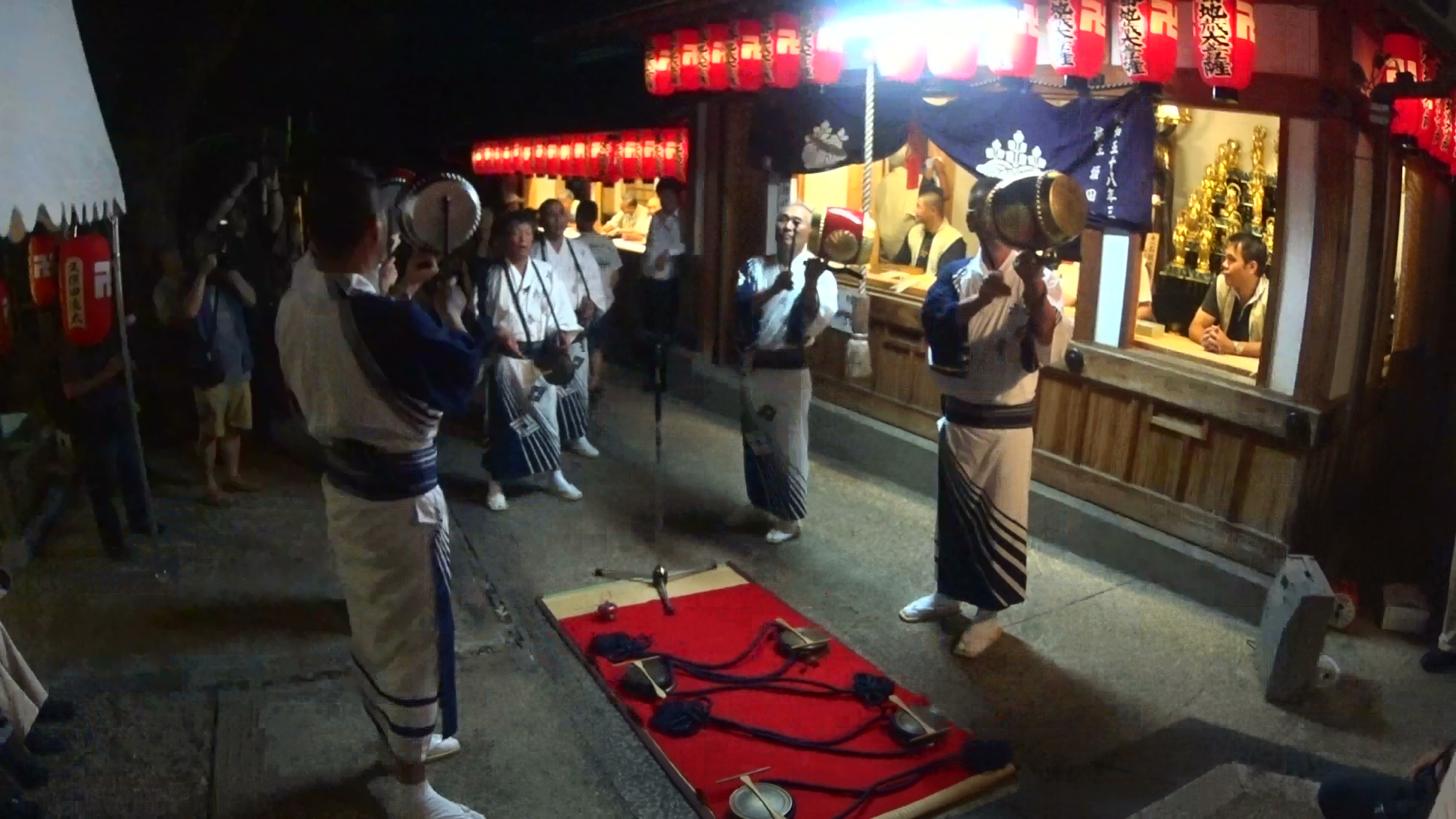 地蔵盆の日に浄禅寺での奉納